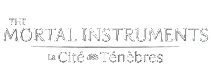 Logo du film.